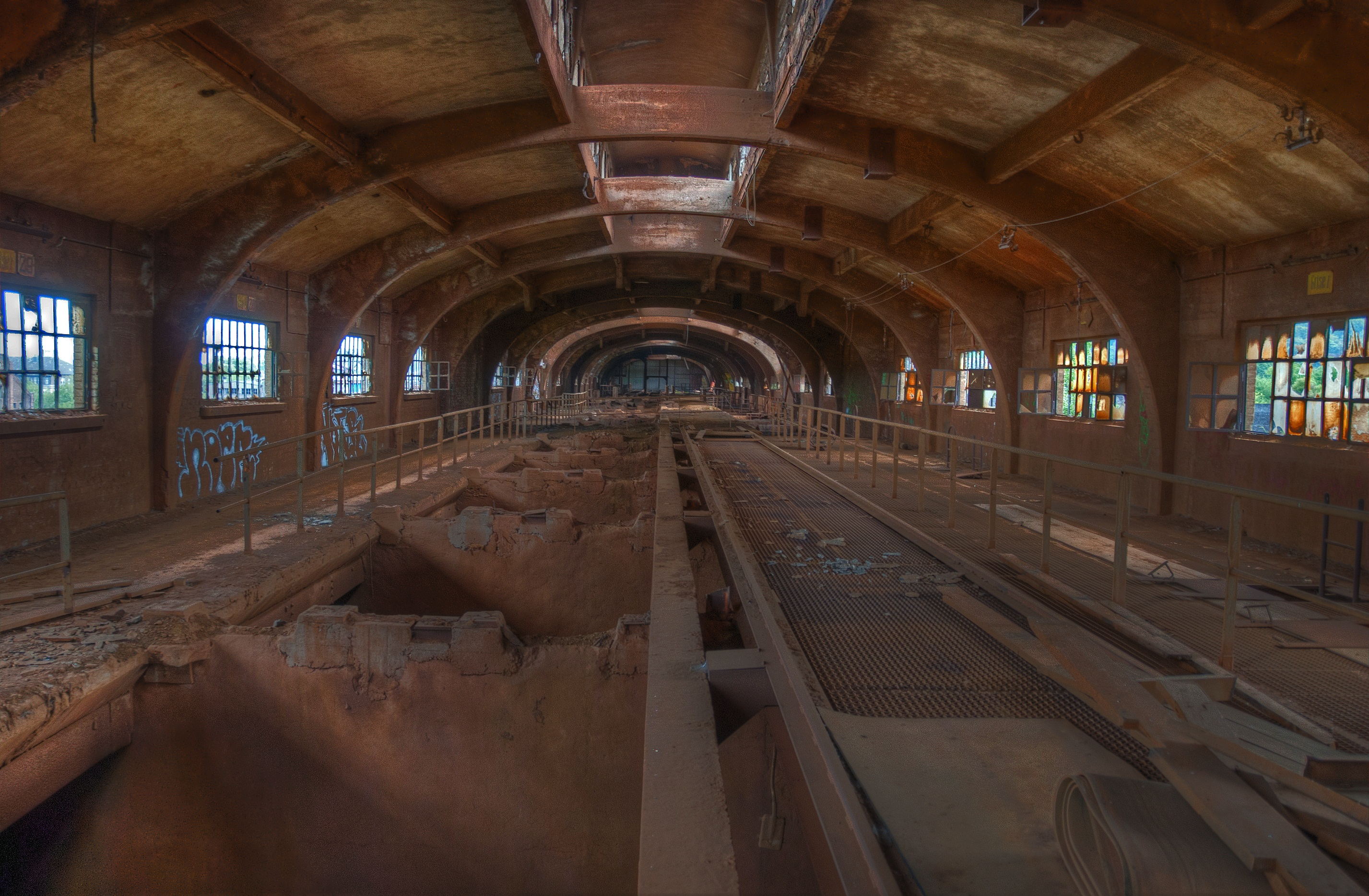 Einer der Drehorte des Filmes "Die purpurnen Flüsse 2 " in Esch-sur-Alzette/ Luxemburg. Das ehemalige Industriegebiet "Terre Rouge" diente als Kulisse.